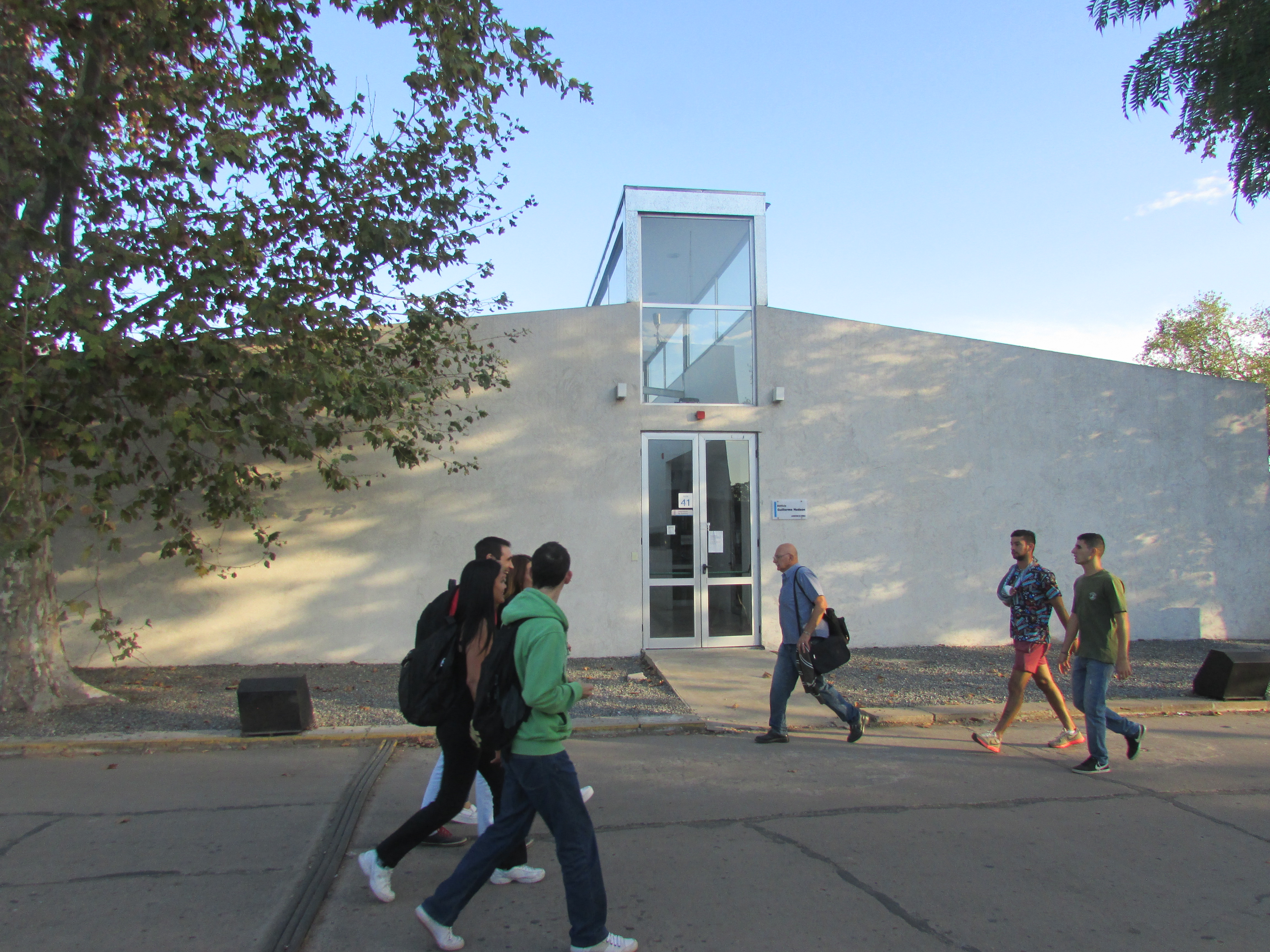 Frente de laboratorios de ingeniería y bioquímica